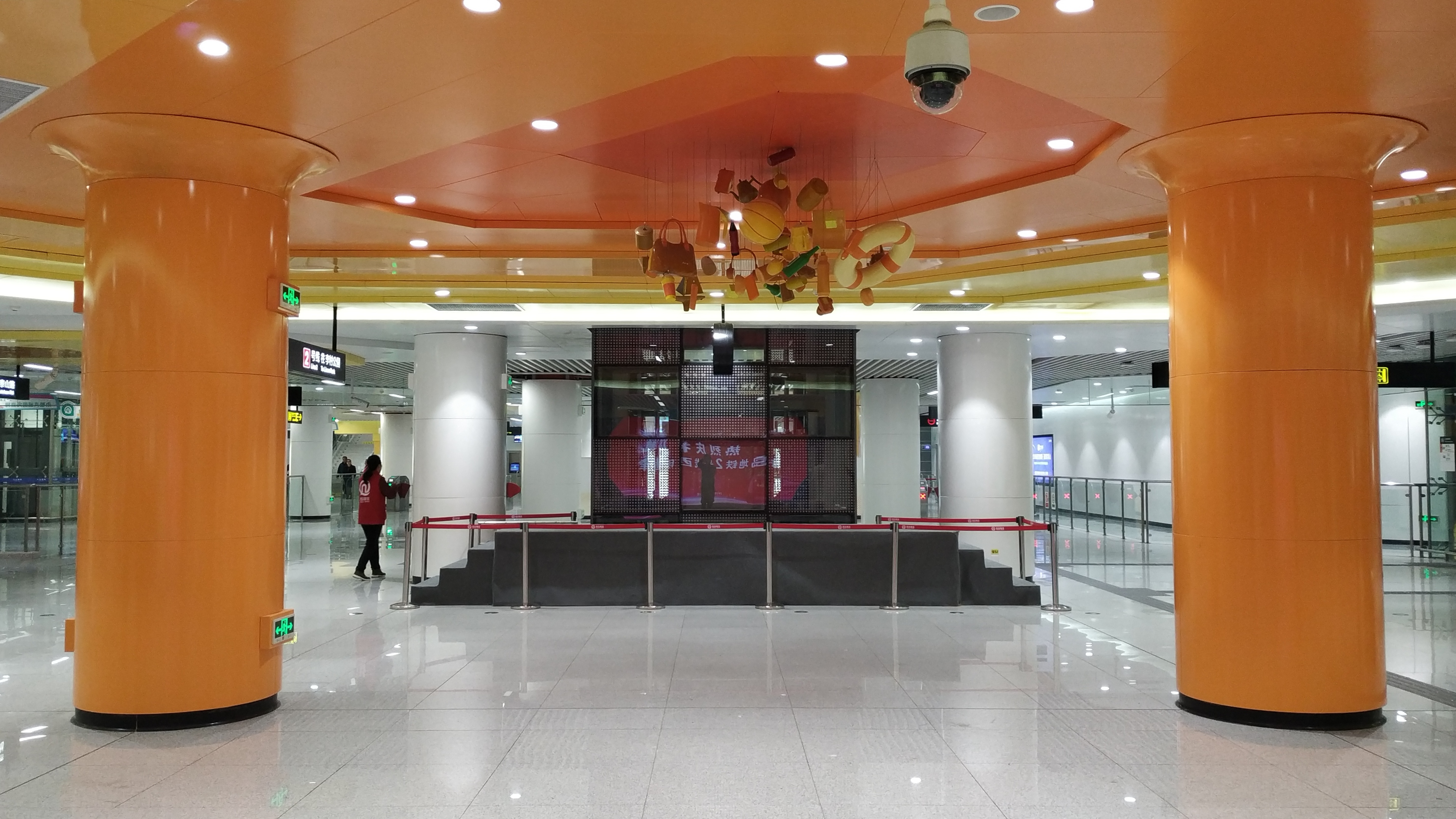 中文（中国大陆）: 台东站站厅